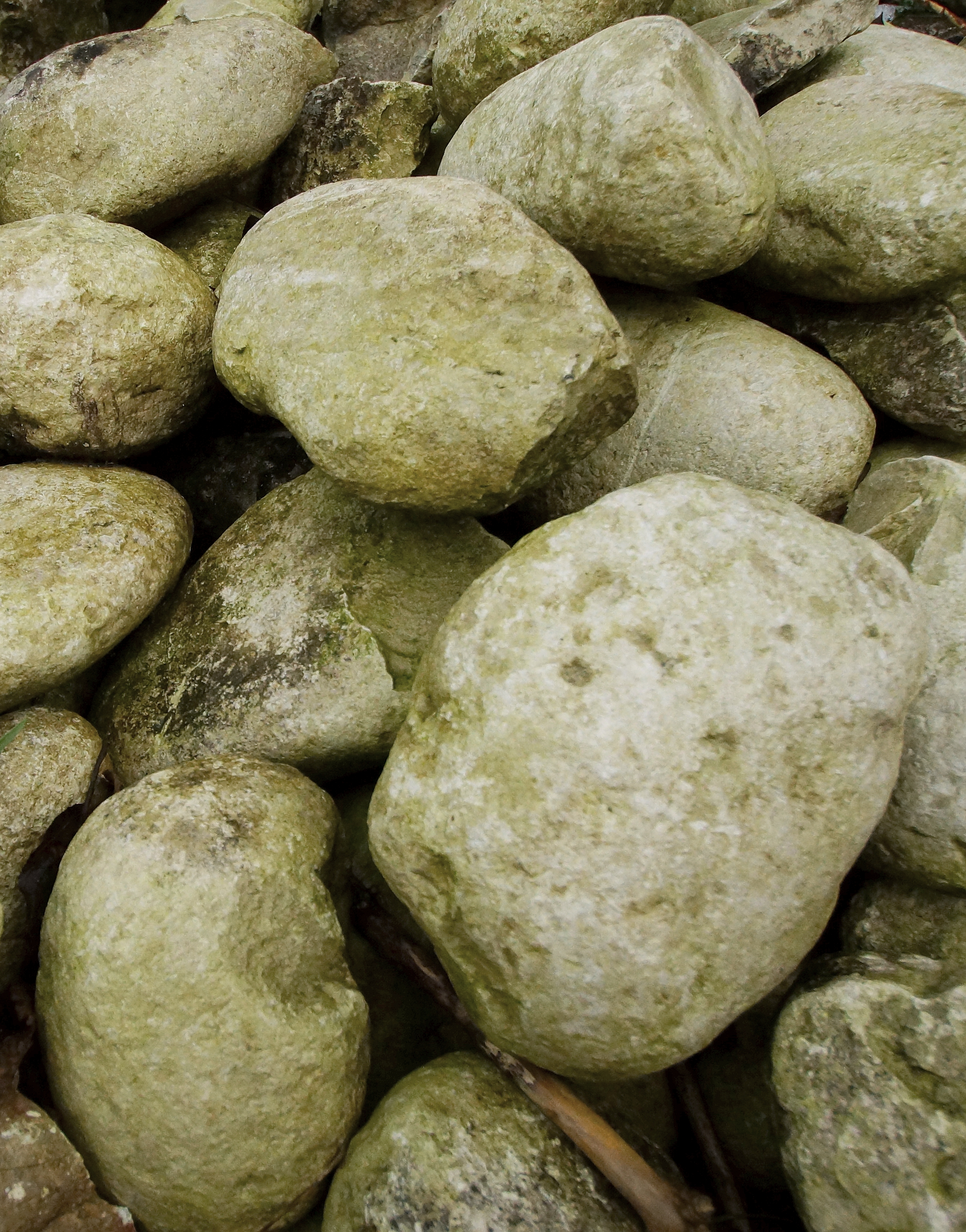 Kalkrullesten, råstof til kalkbrænding